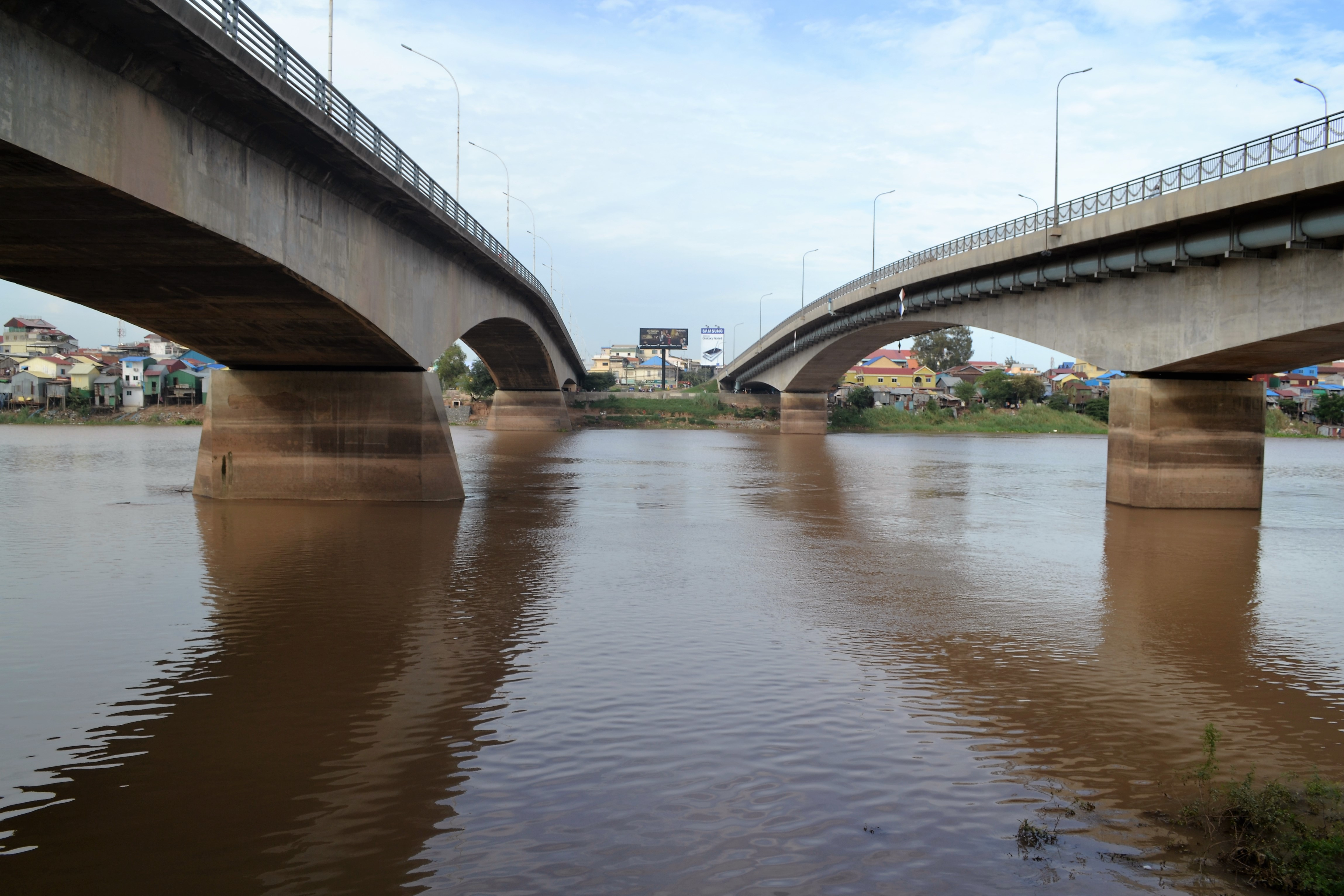 vue côté rive ouest